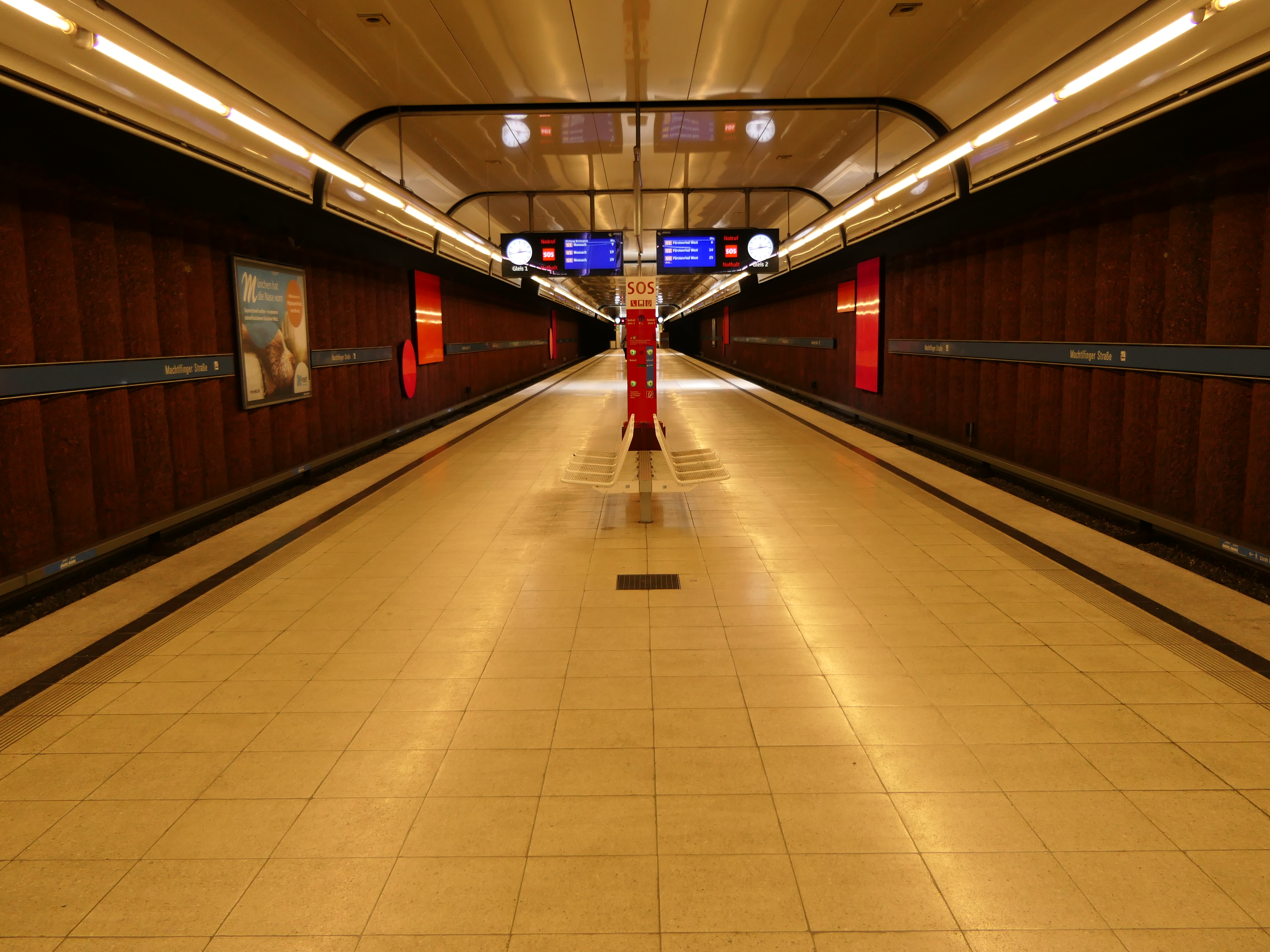 Bahnsteigebene am U-Bahnhof Machtlfinger Straße in München.